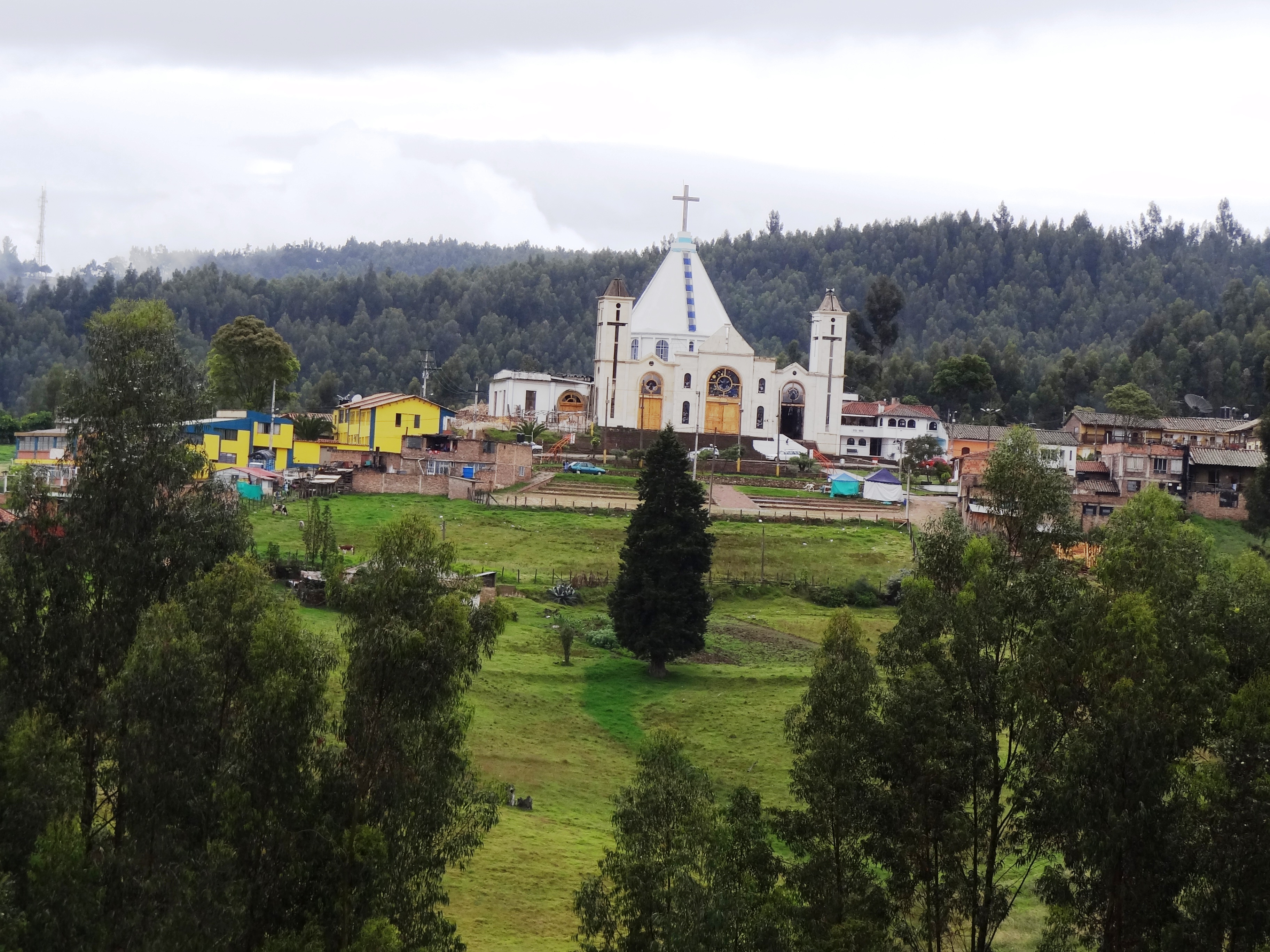 Caserío e Iglesia en la vereda Morcá, Sogamoso, departamento de Boyacá (Colombia)